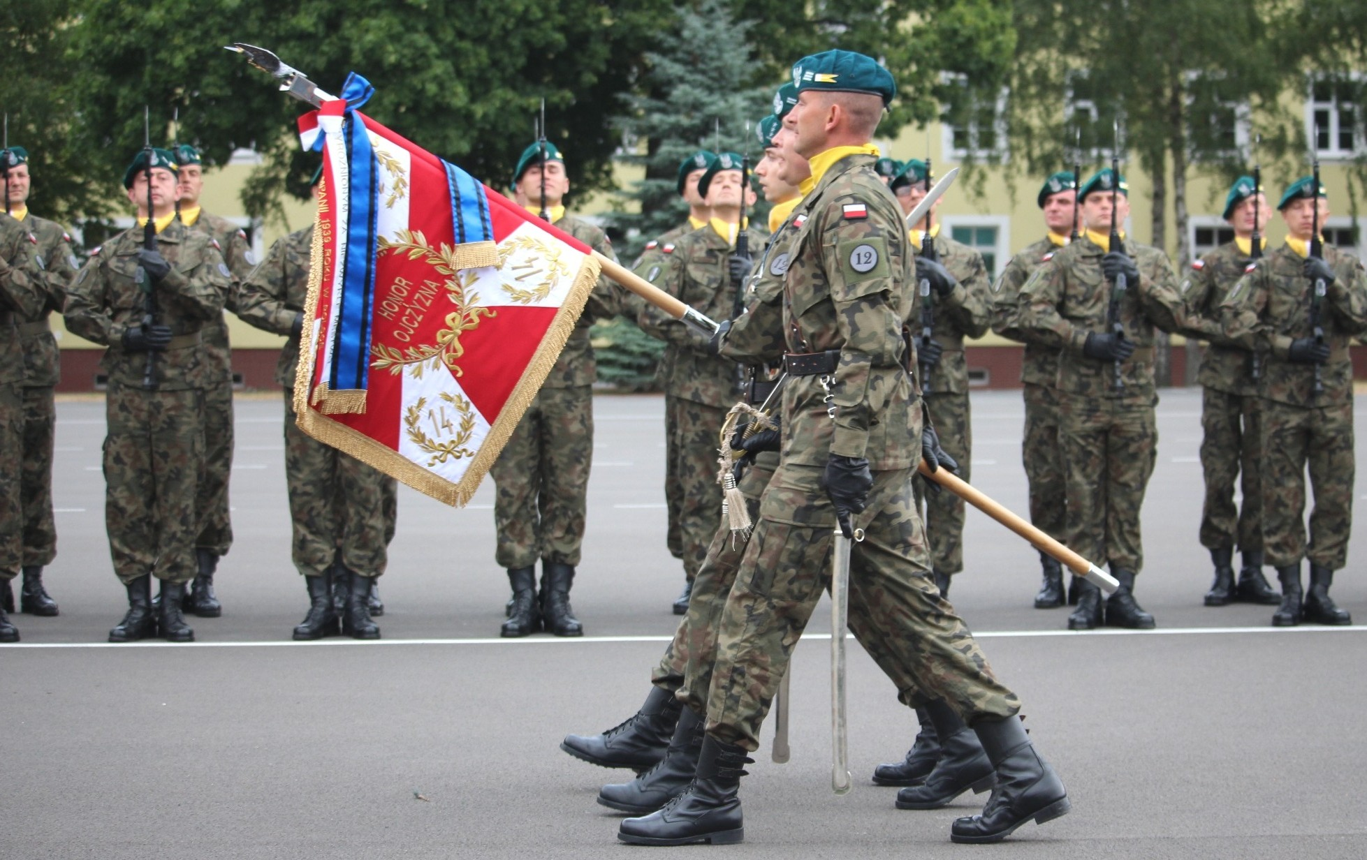 Replika sztandaru 2bpzmot